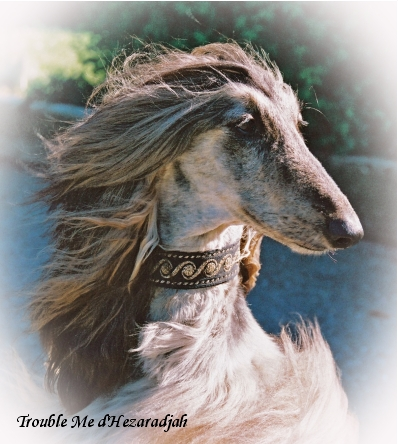 Lévrier afghan femelle Trouble Me d'Hezaradjah